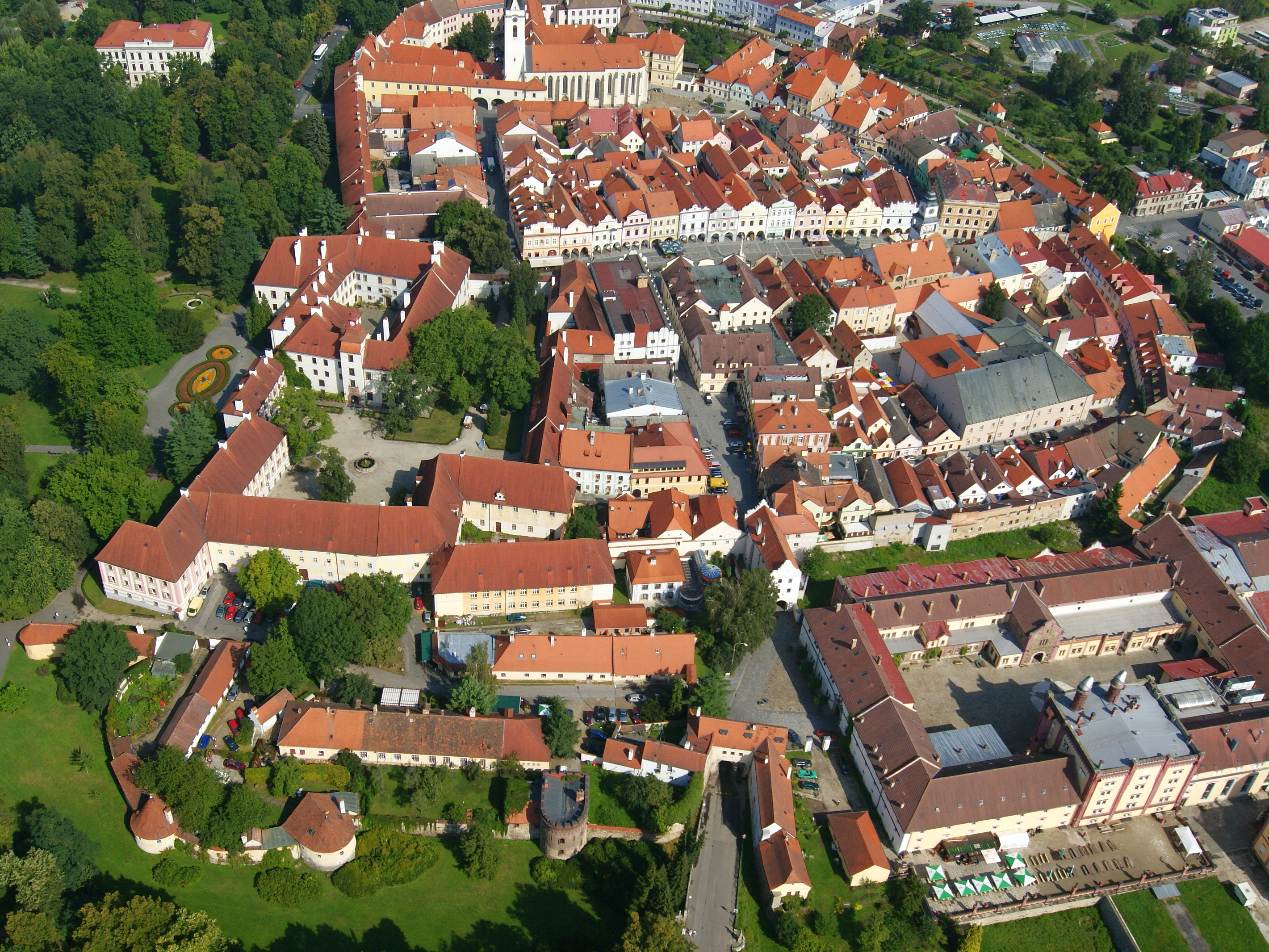 Městské opevnění (Třeboň), Třeboň